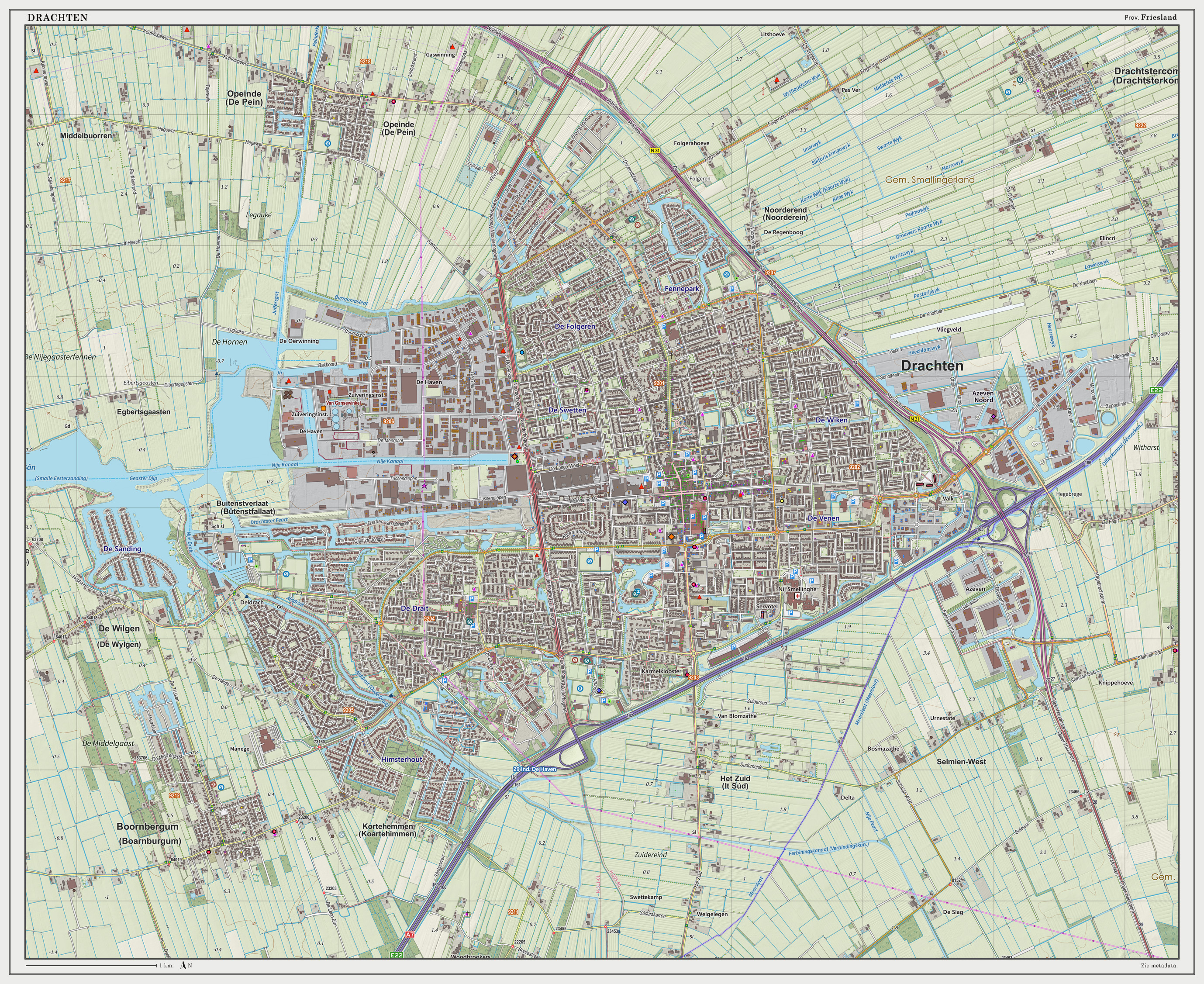 Topografische kaart van Drachten (woonplaats). Resolutie: 300 pixels/km. Kaartbeeld samengesteld uit de open geodata van de Top10NL en Top25namen (Basisregistratie Topografie, Kadaster), Creative Commons BY licentie. Gebouwvlakken uit open geodata BAG extract. Wegen uit de OpenStreetMap. Reliëfschaduw uit de Actuele Hoogtekaart AHN2. Samenstelling en kleurenschema: Jan-Willem van Aalst, met QGIS2. Zie ook de Legenda.